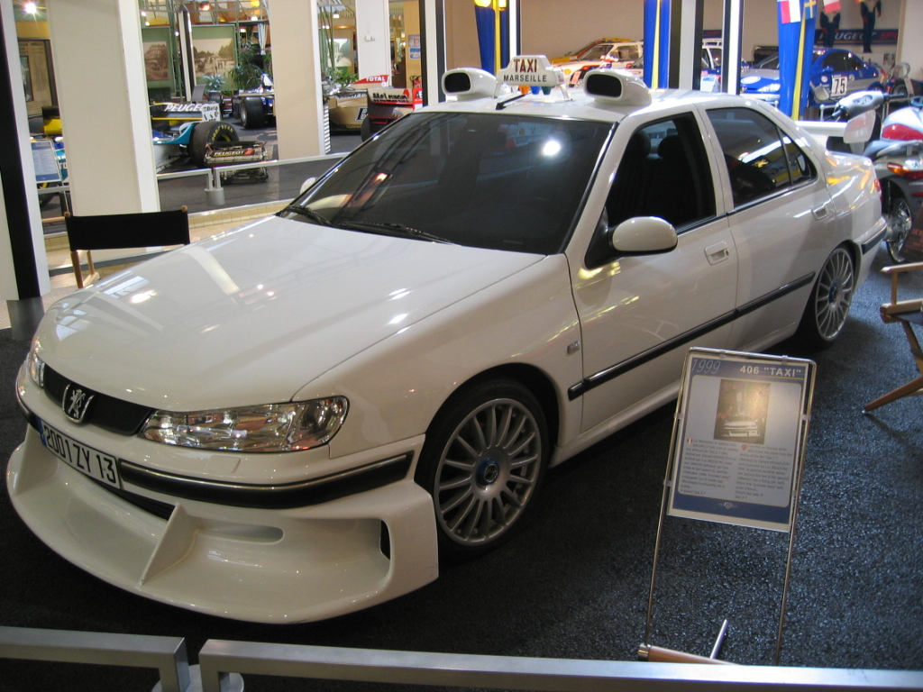 Peugeot 406 taxi Marseille du film Taxi 2 de Luc Besson au musée Peugeot de Montbeliard